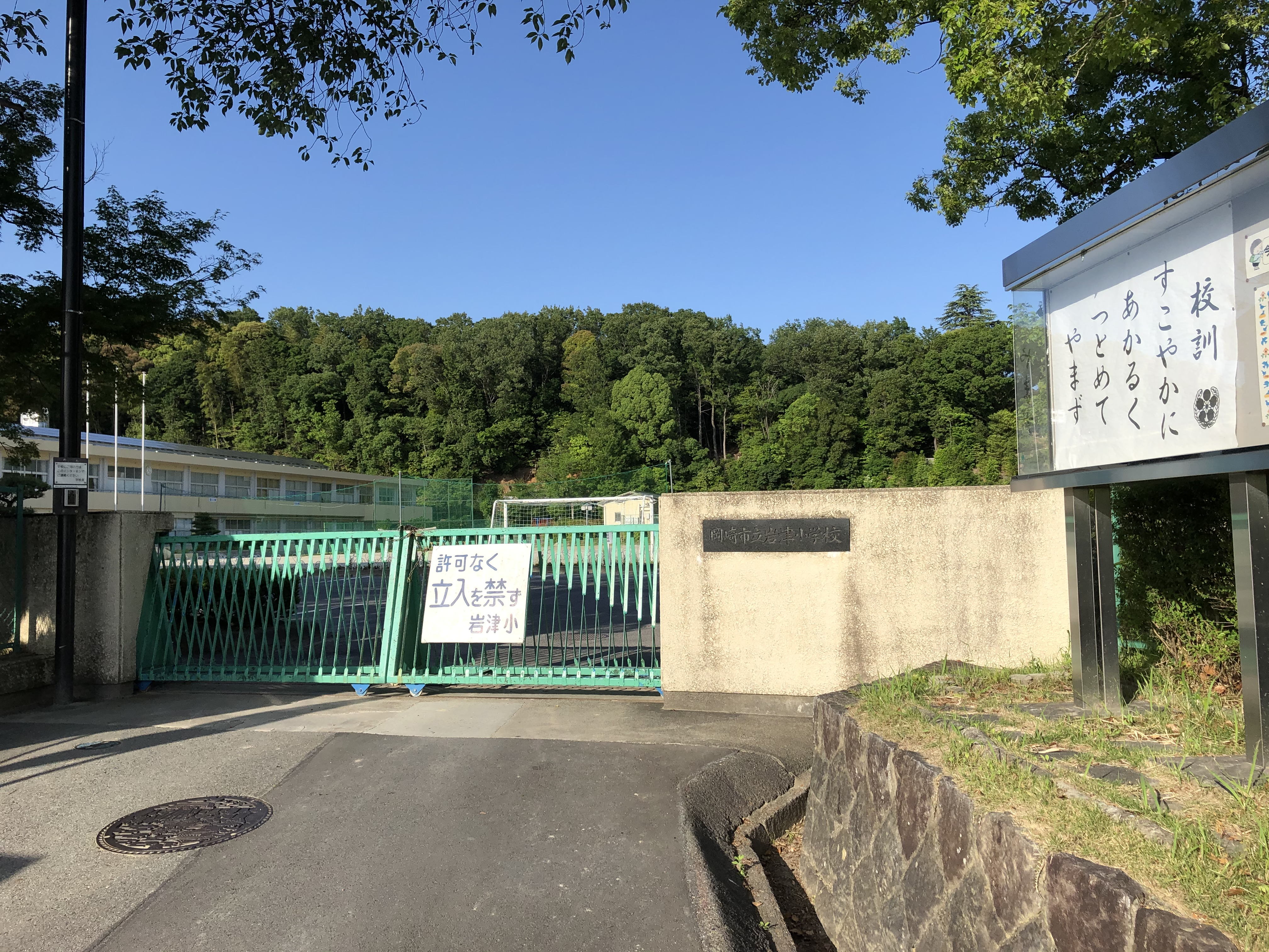 岡崎市立岩津小学校（岡崎市岩津町）